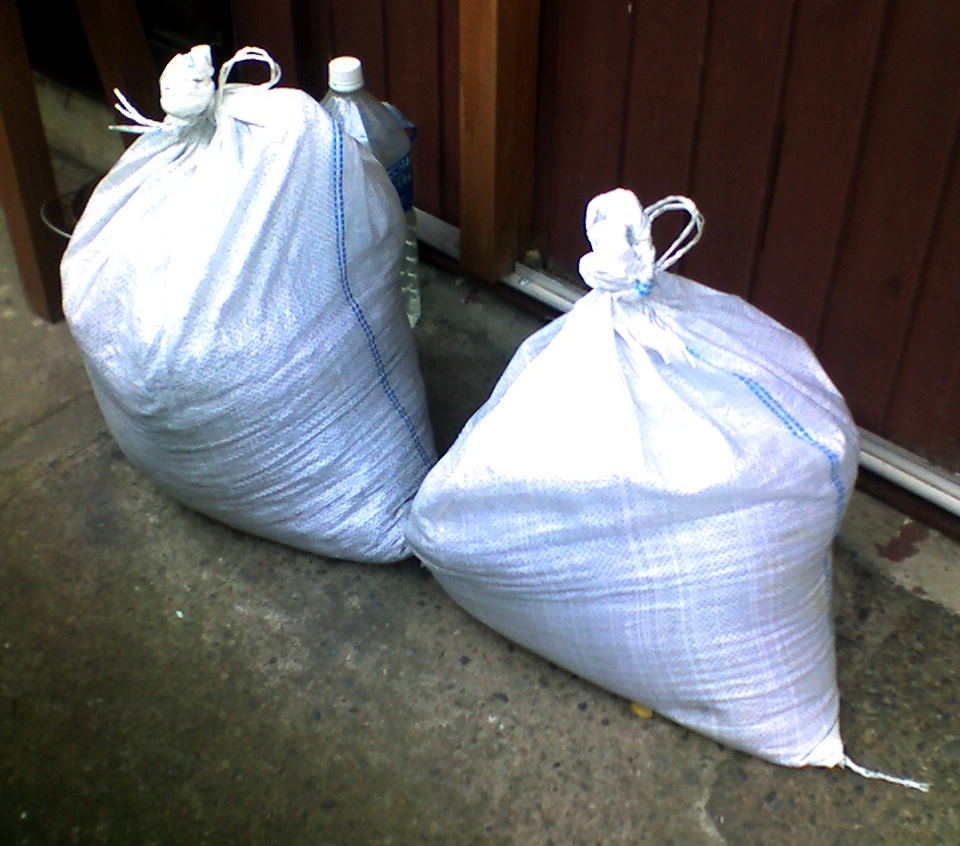 Sandbag(土嚢)